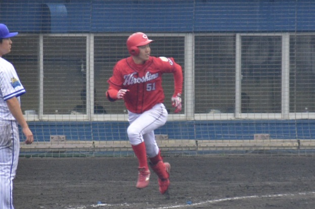 2019年2月24日、宜野湾市営球場にて撮影。